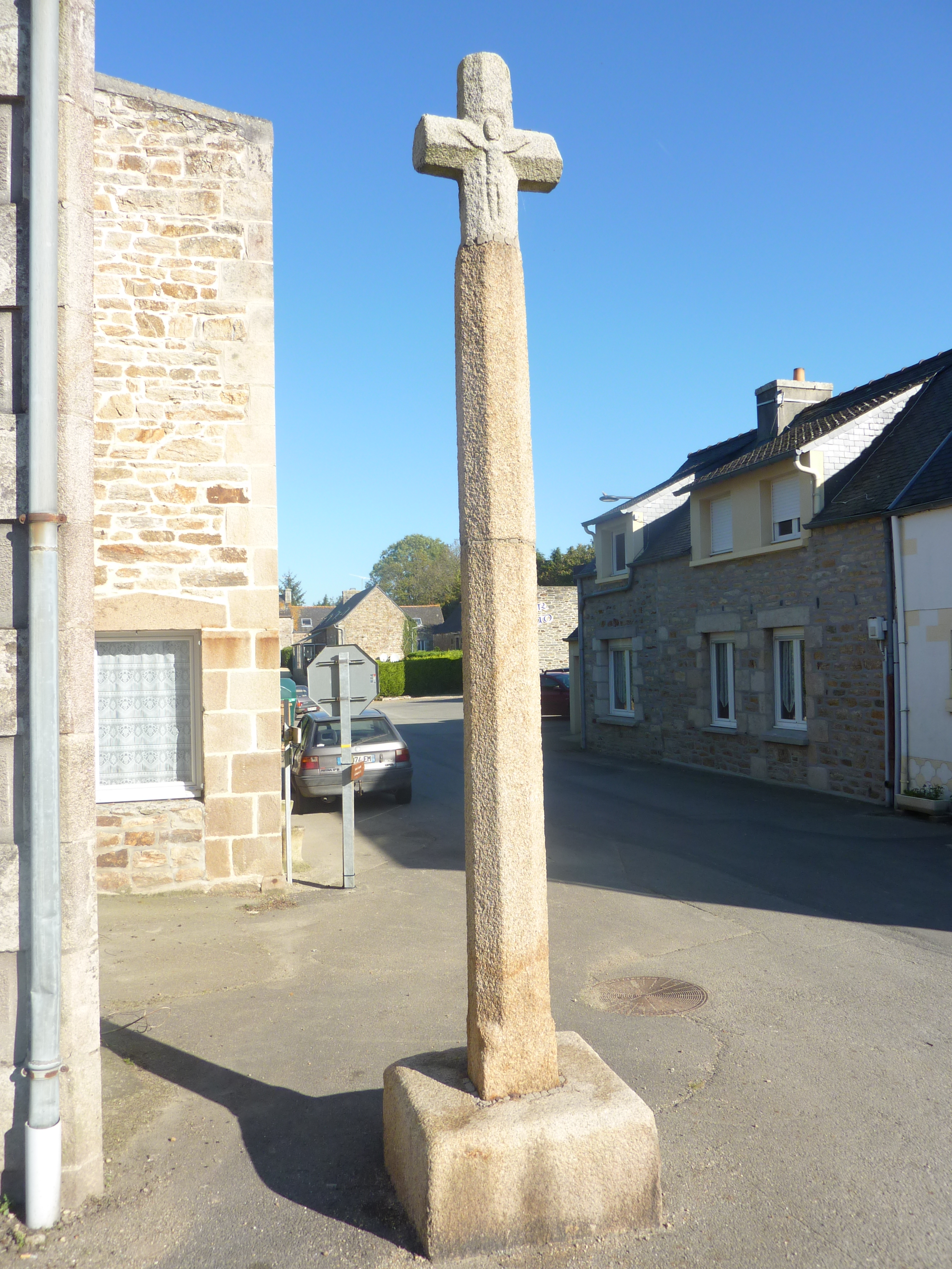 Lannéanou : bourg, la croix du jubilé (inscription sur le socle : "Jubilé 1928)